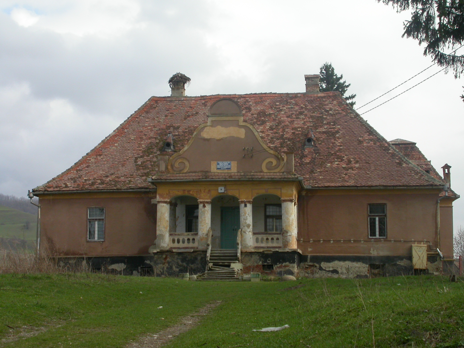 Fostul castel Tobiasi, 1770